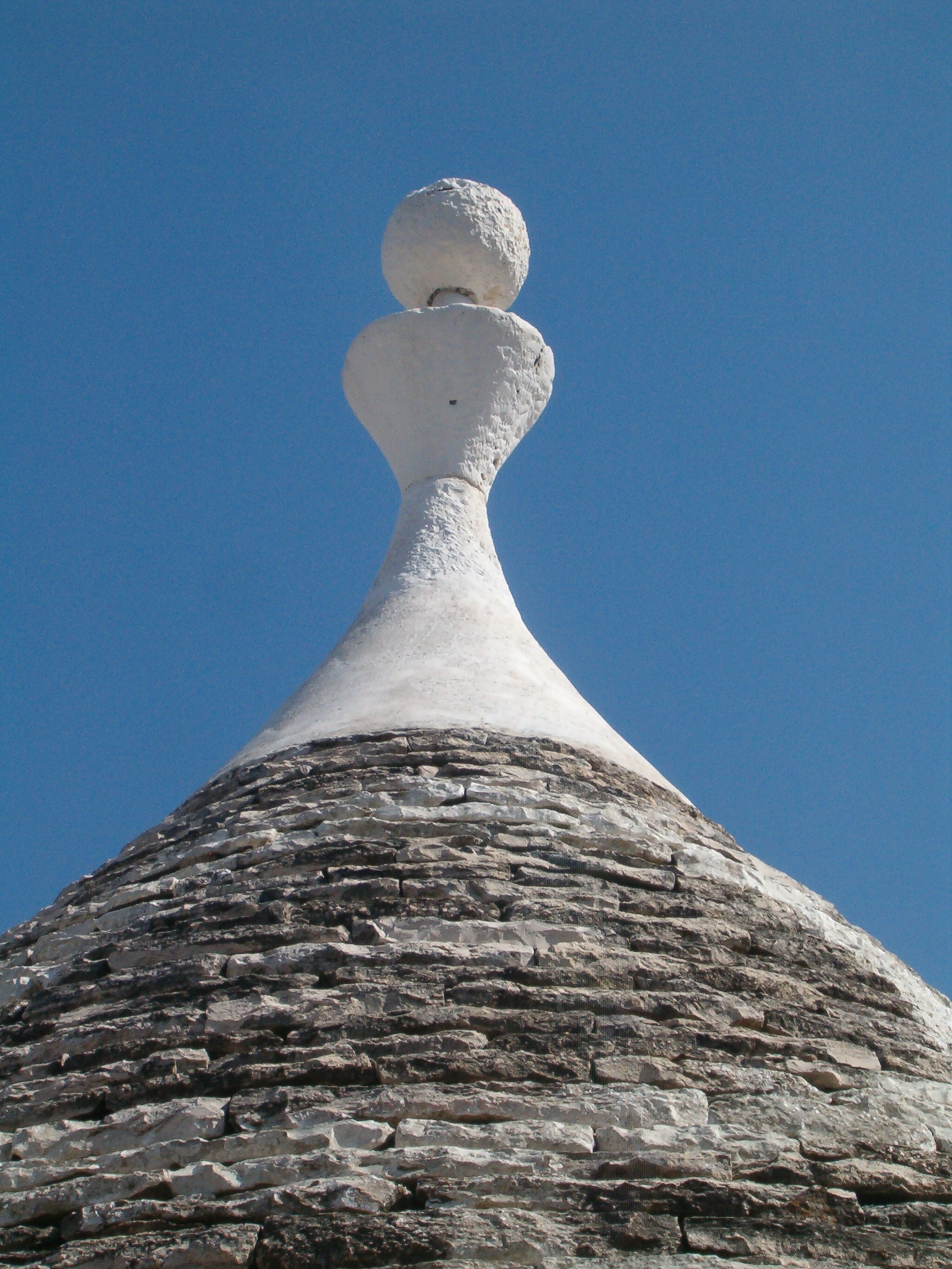 Trulli di Alberobello, Italy